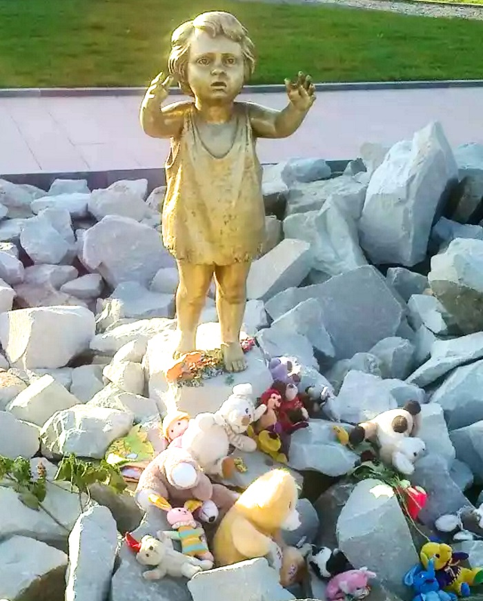 Памятник детям убитым в Концлагере Красный